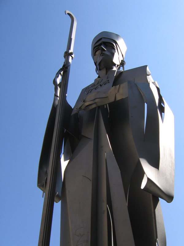 Estàtua de l'Abat Oliba, a la Plaça del Bisbe Oliba (Vic)